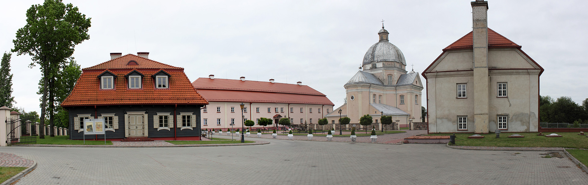 Liškiavos dvaro panorama.